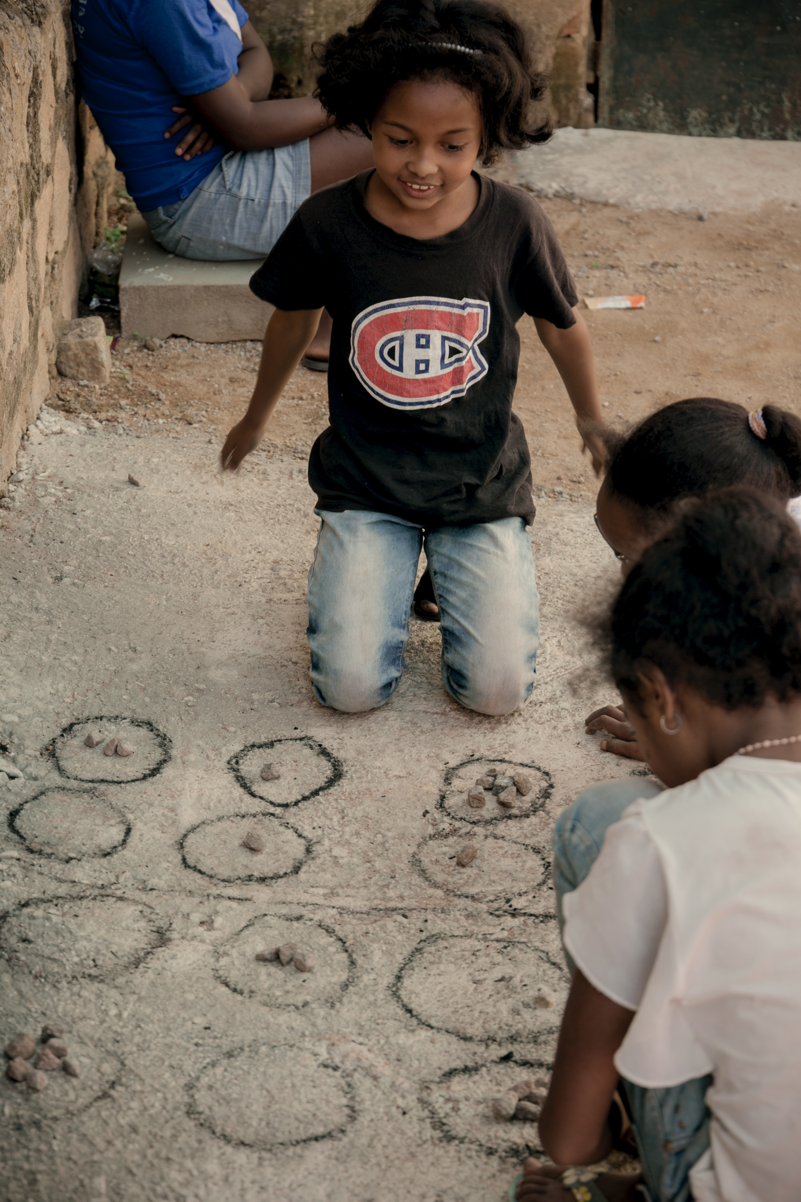 Des petites fille jouant au "Katro" . jeu consiste à récupérer tous les pions de l'adversaire. This is an image with the theme "Play" from: Madagascar